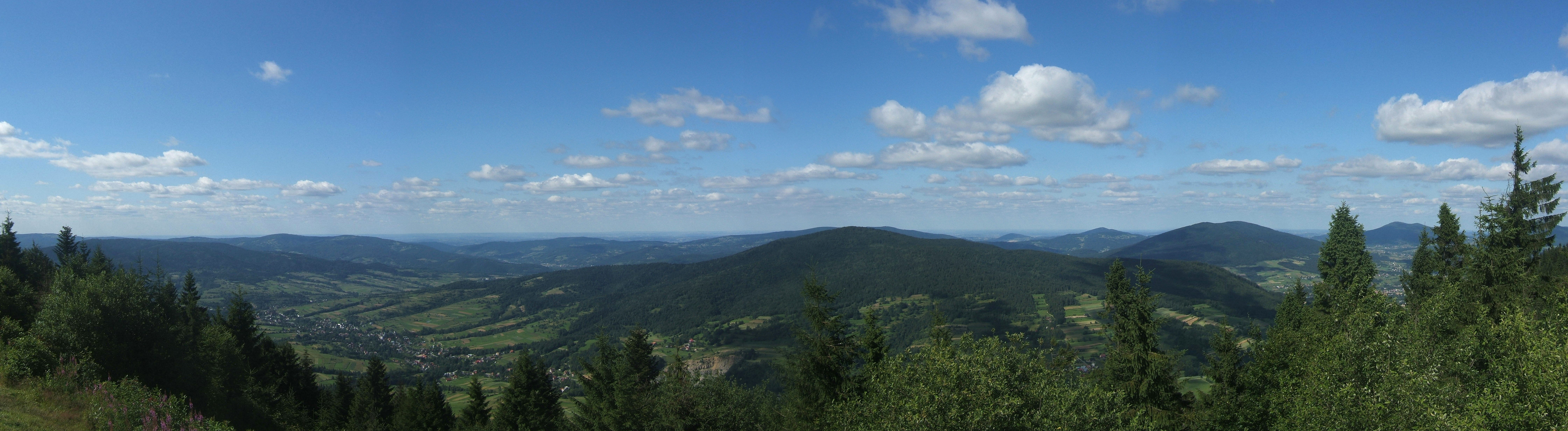 Panorma w kierunku północnym spod schroniska na Luboniu Wielkim